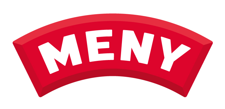 Logoen til butikkjeda MENY